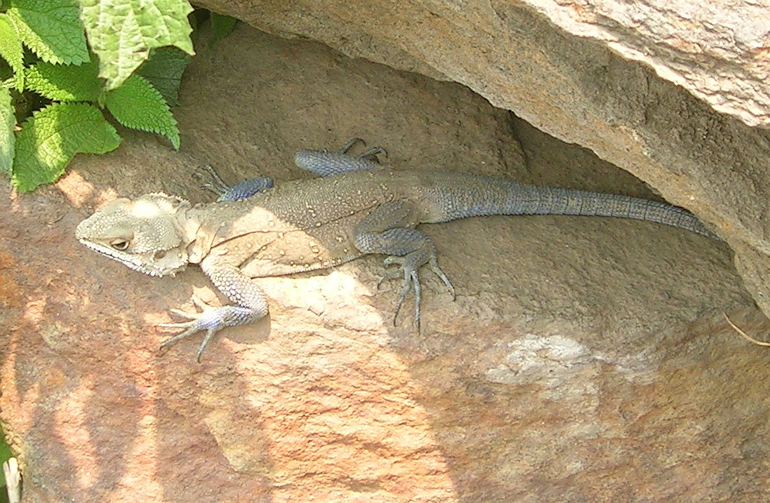 Laudakia tuberculata[1] (Agama tuberculata), Munsiyari, Uttarakhand, India